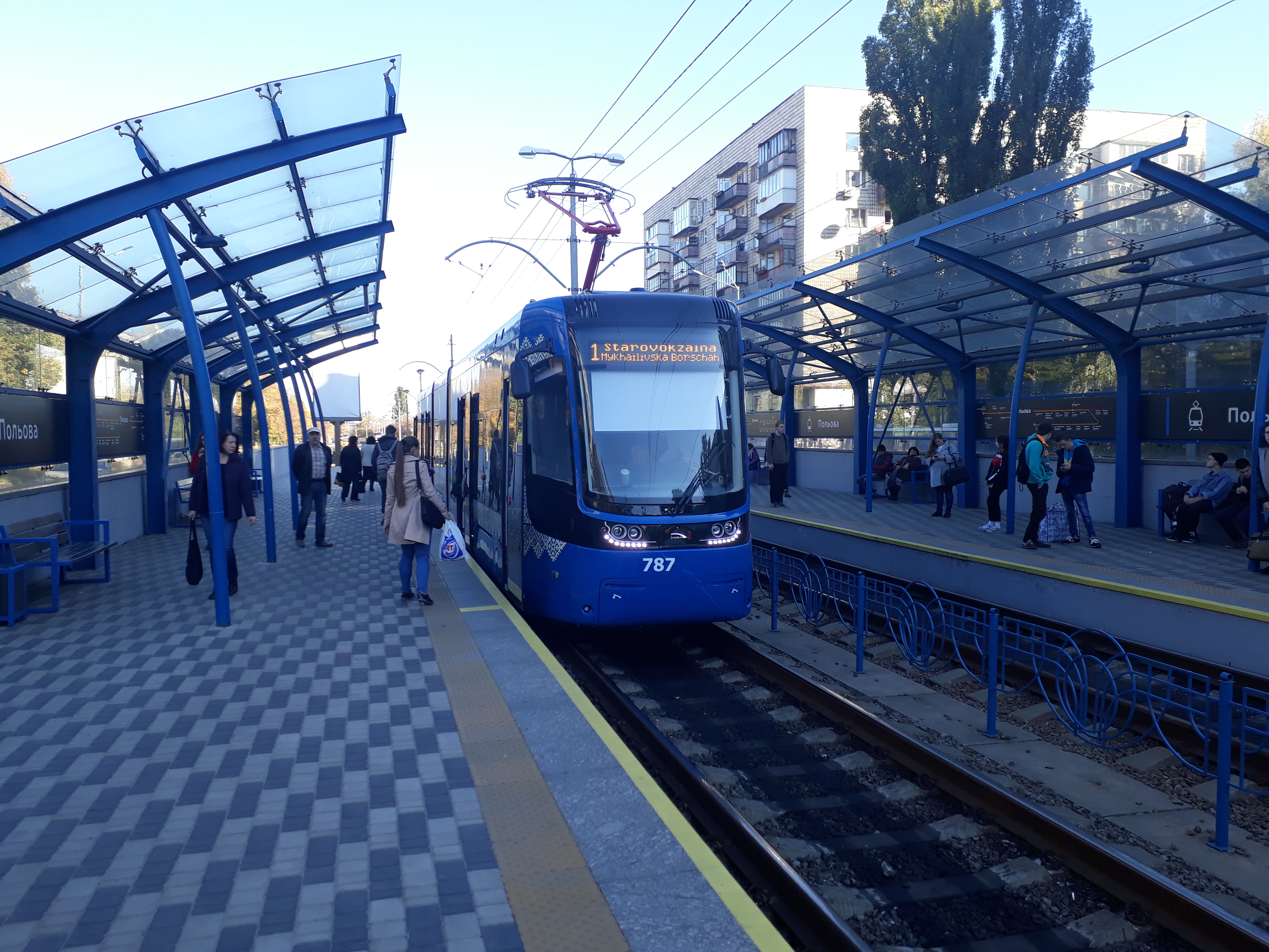 Трамвай Pesa на станции Полевая